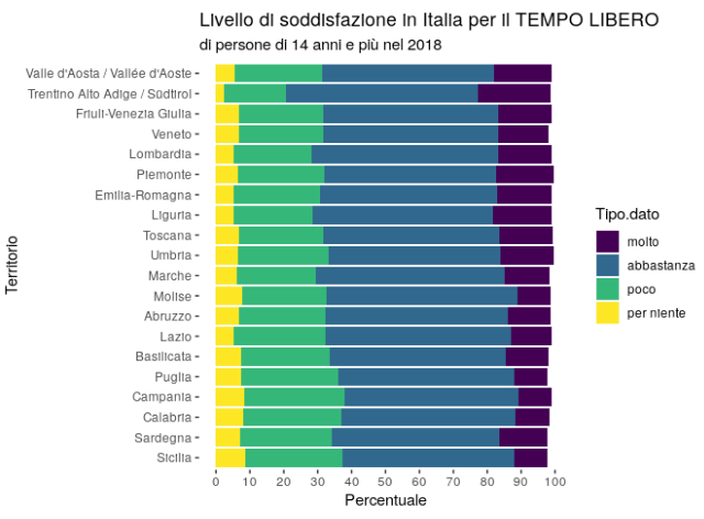 File realizzato con RStudio con dati Istat